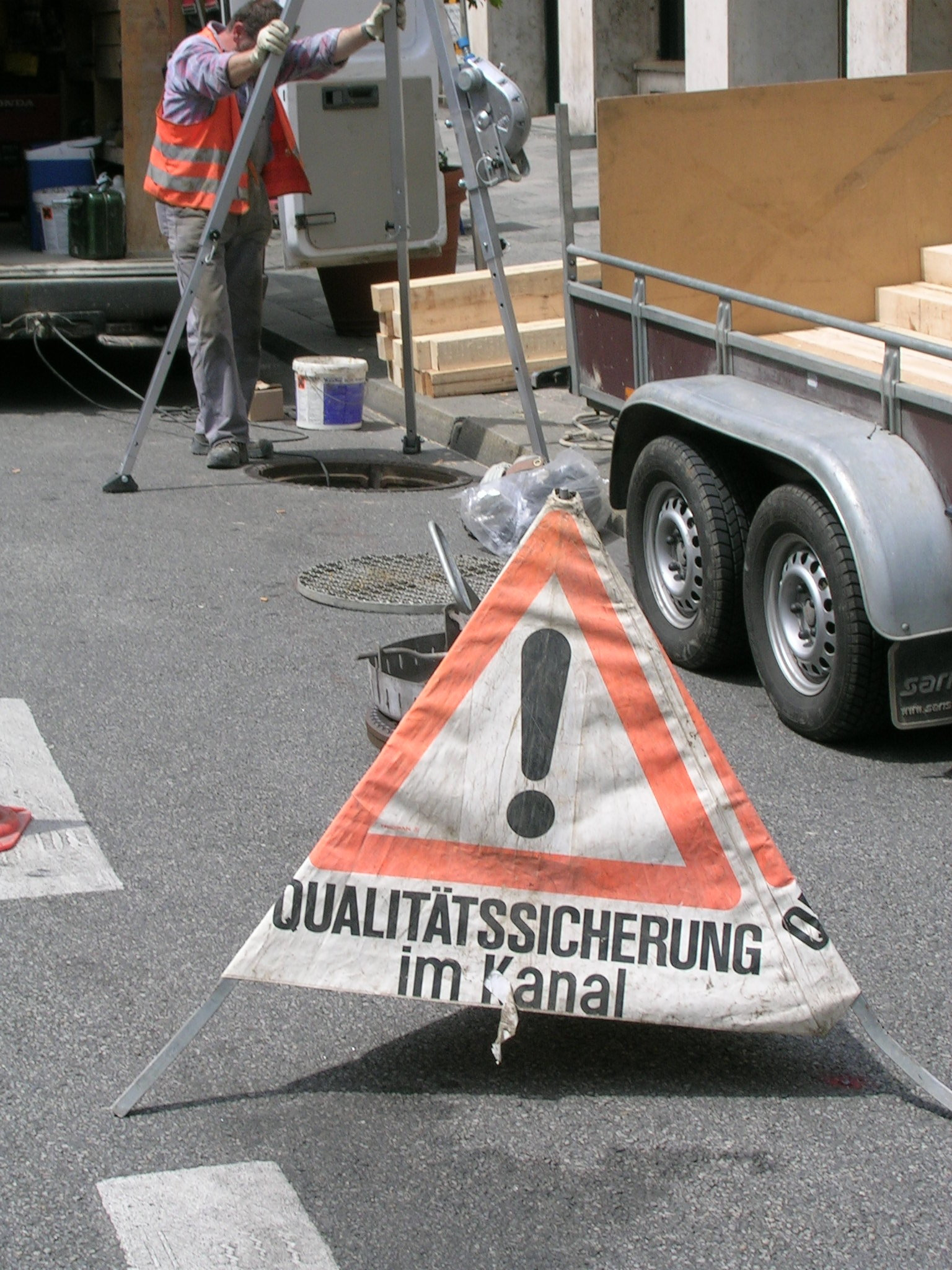 Wortgebrauch "Qualitätssicherung" anno 2008